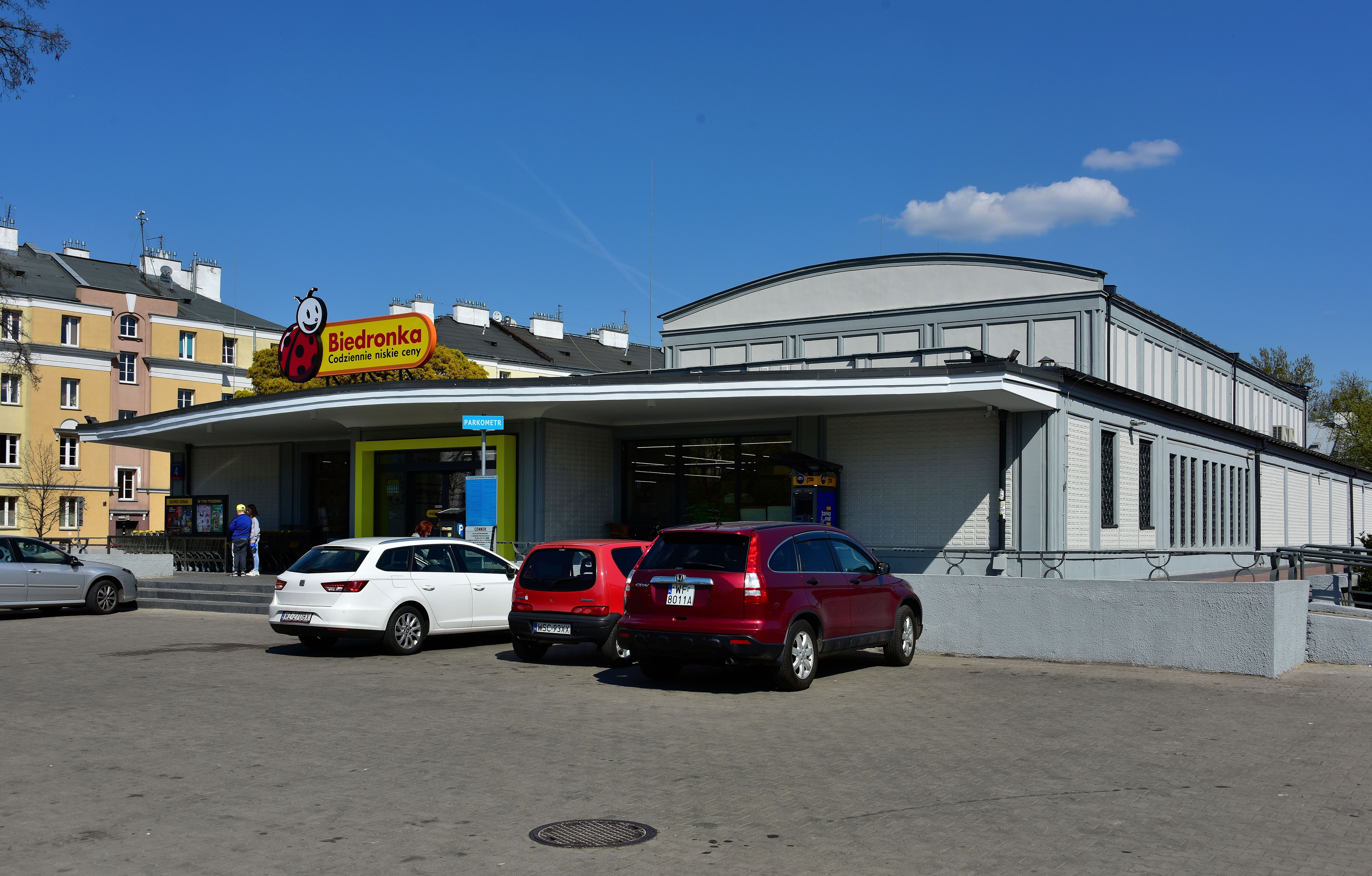 Dawne Kino 1 Maj przy ul. Podskarbińskiej 4 w Warszawie